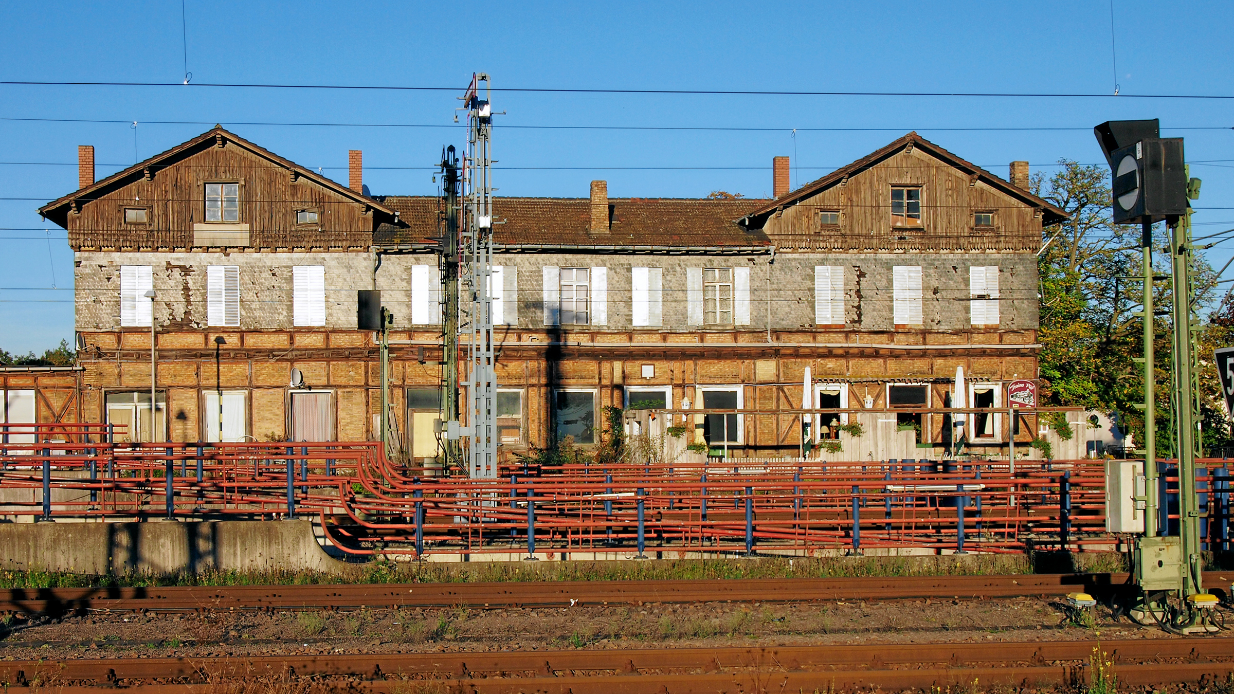 Germersheim, alter Bahnhof